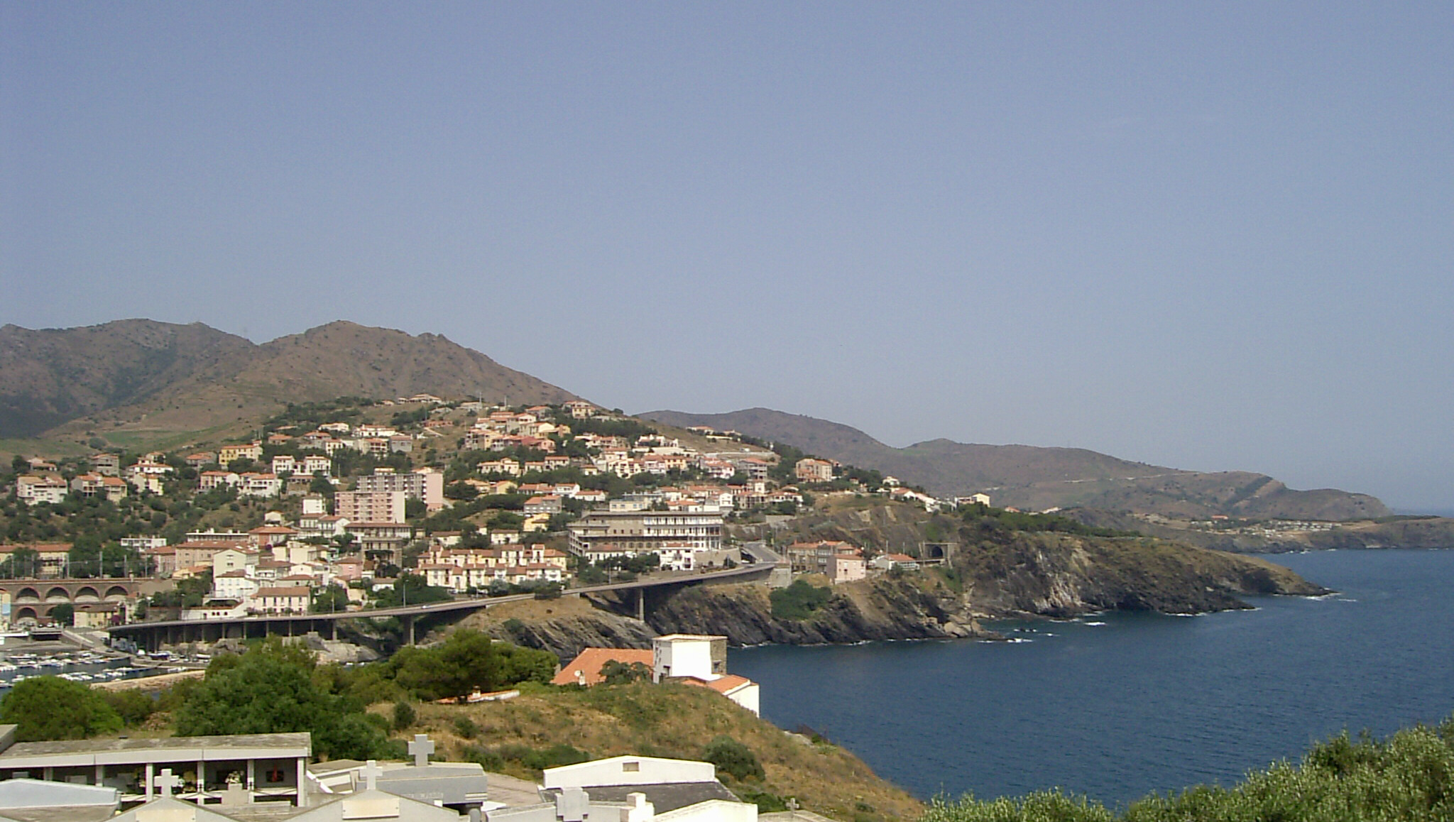 Vue depuis le sud-est sur Cerbère